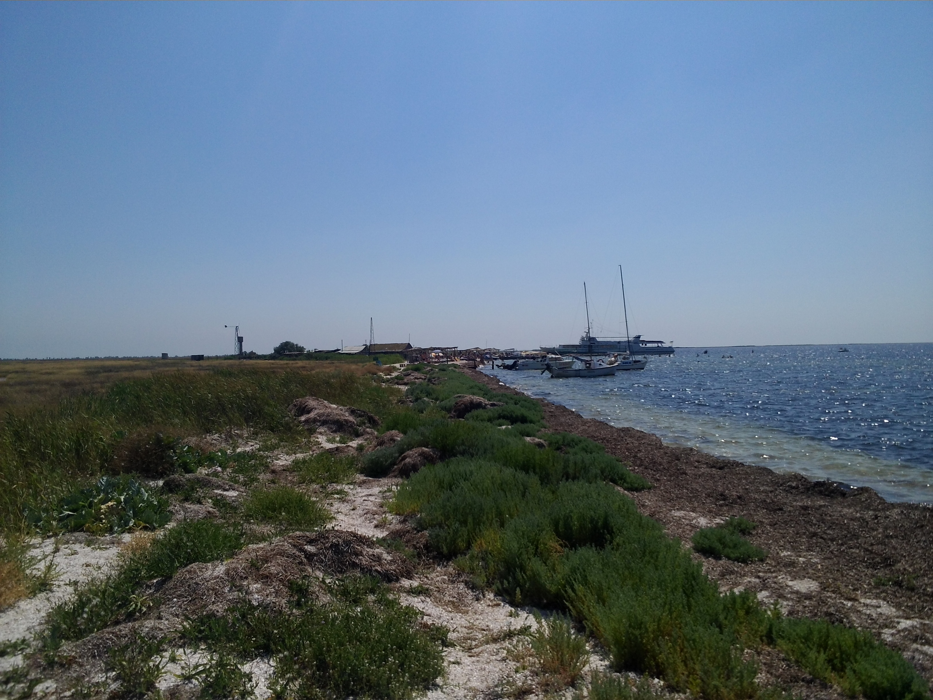 Джарилгацький, Скадовський район, острів Джарилгач